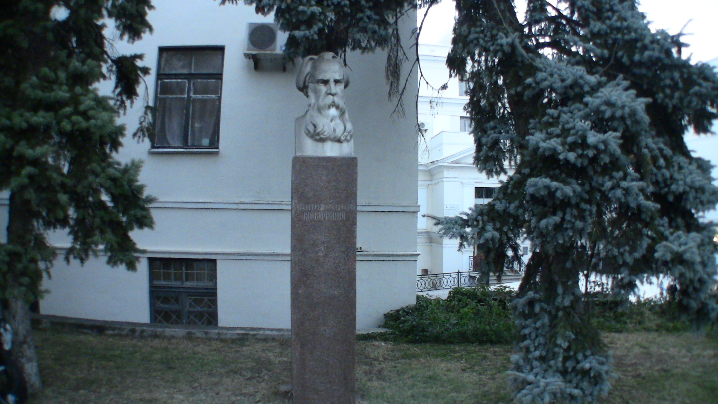 Памятник учёному-биологу, академику императорской Санкт-Петербургской АН (с 1890), основателю и первому директору Севастопольской биостанции (1892) и морского аквариума (1897) Ковалевскому А.О.: бульвар Приморский, Ленинский район, Севастополь This object is located on the Crimean Peninsula and recognized as cultural heritage by both Russia and Ukraine under the monument ID: 9230201000/ 85-366-0161, respectively. The legal status of the Crimean region is currently disputed.